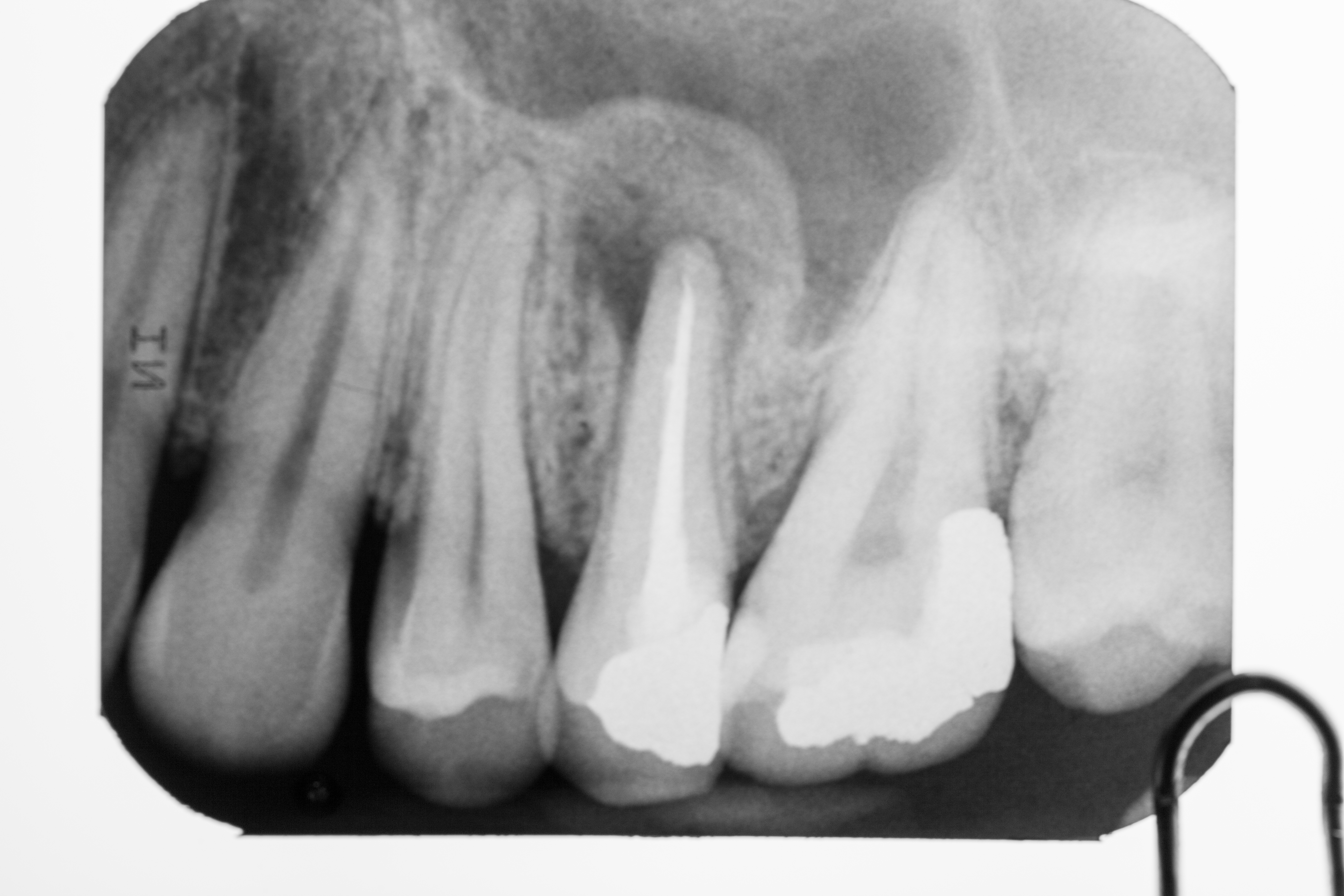 Zähne, diverses